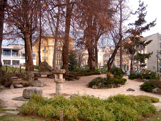 Jardin Japonais dans la ville d'Aix-les-Bains en France dans le département de la Savoie.